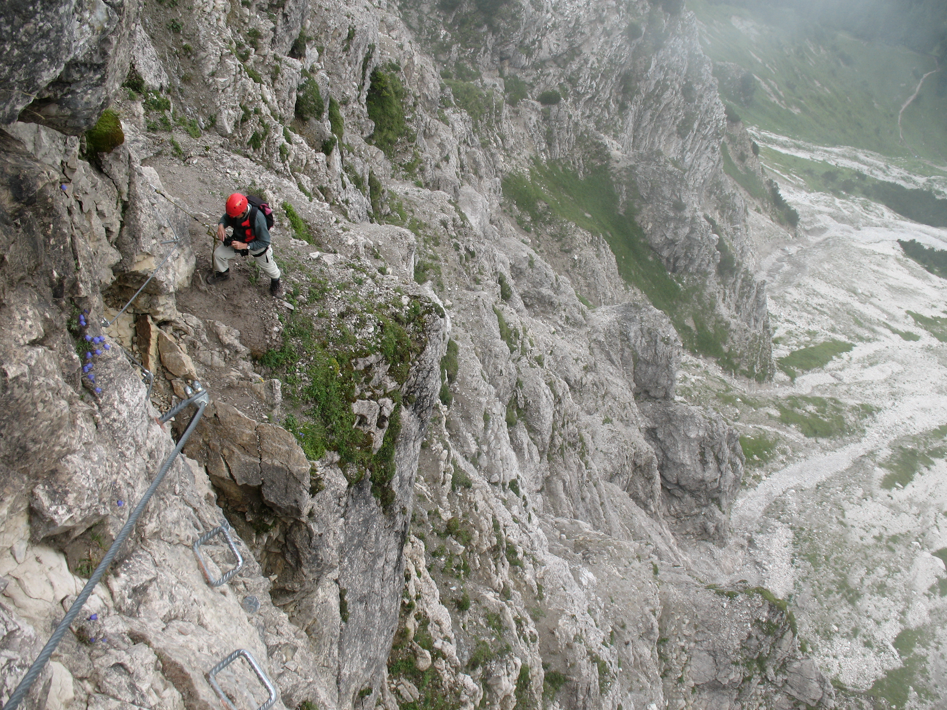 Im Iseler-Salewaklettersteig, Teil I, Schlüsselstelle Bergführerplatte.